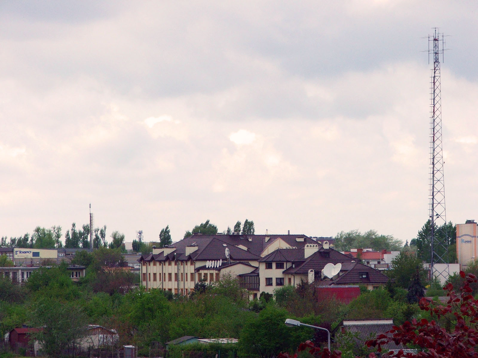 Siedziba Radia Maryja w Toruniu, ul. Żwirki i Wigury. Radio Maryja headquater in Toruń at Żwirki i Wigury street.